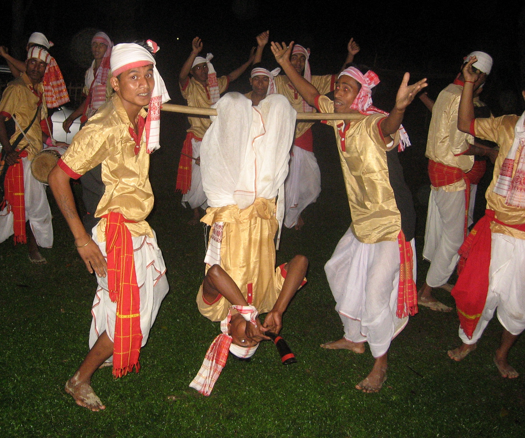 অসমীয়া: বিহু হুচৰিত পেঁপাবাদকসকলে নানান ভংগীমাৰে পেঁপাবাদন আগবঢ়ায় । ইয়াত পেঁপাবাদকজনে ওলোটা হৈ পেঁপা বজাইছে ৷